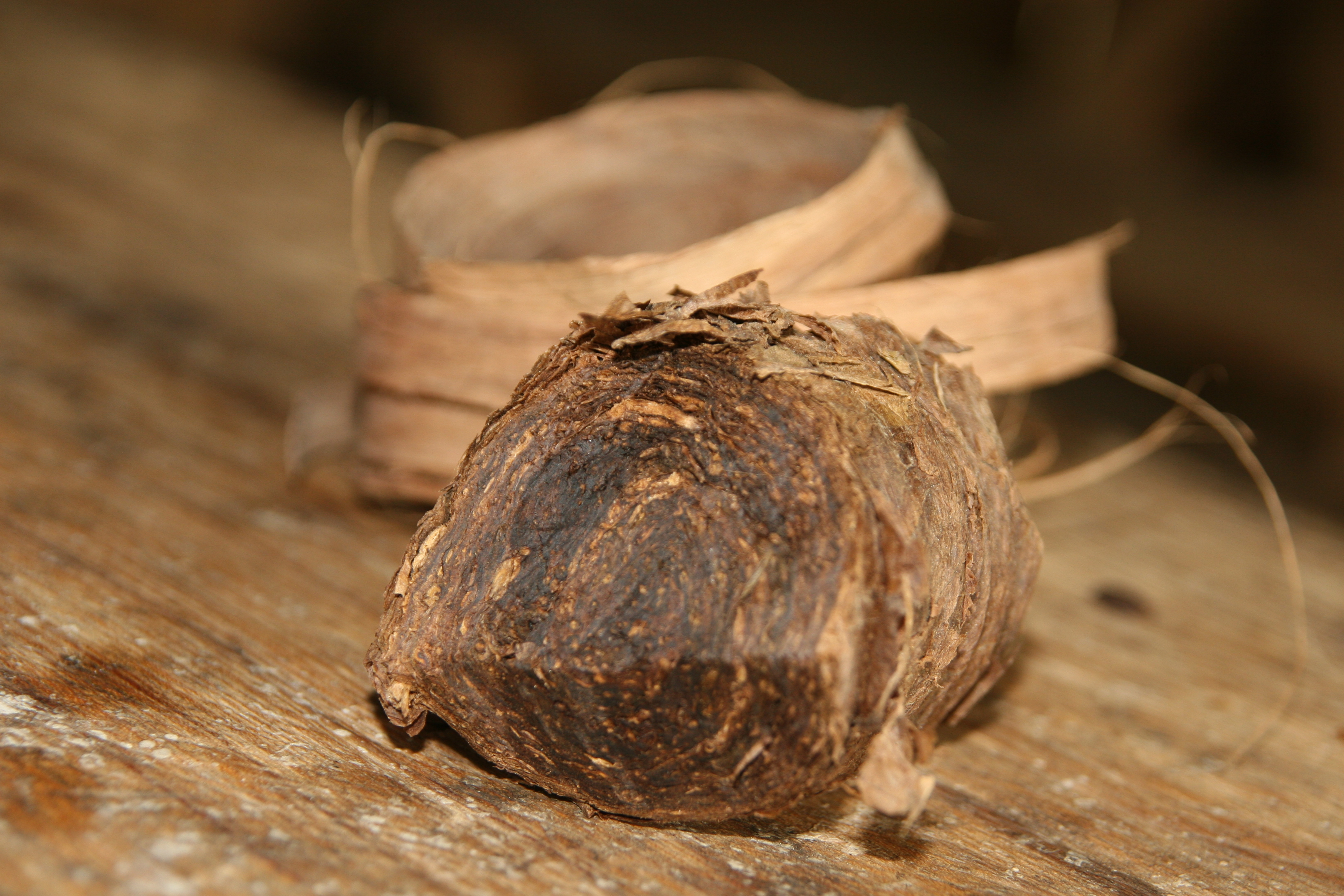 Rollo cortado de mapacho (Nicotiana rustica) en el Centro Takiwasi, Tarapoto, Perú. El mapacho es utilizado en la medicina tradicional amazónica como una planta depurativa.